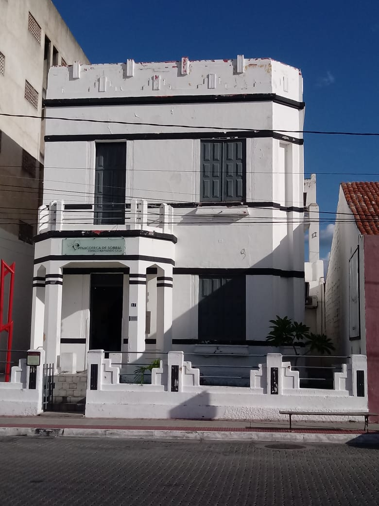 Vista da frente do palacete da Pinacoteca de Sobral.